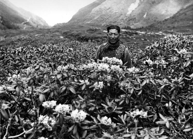 Natula, blühende Rhododendron mit Akey